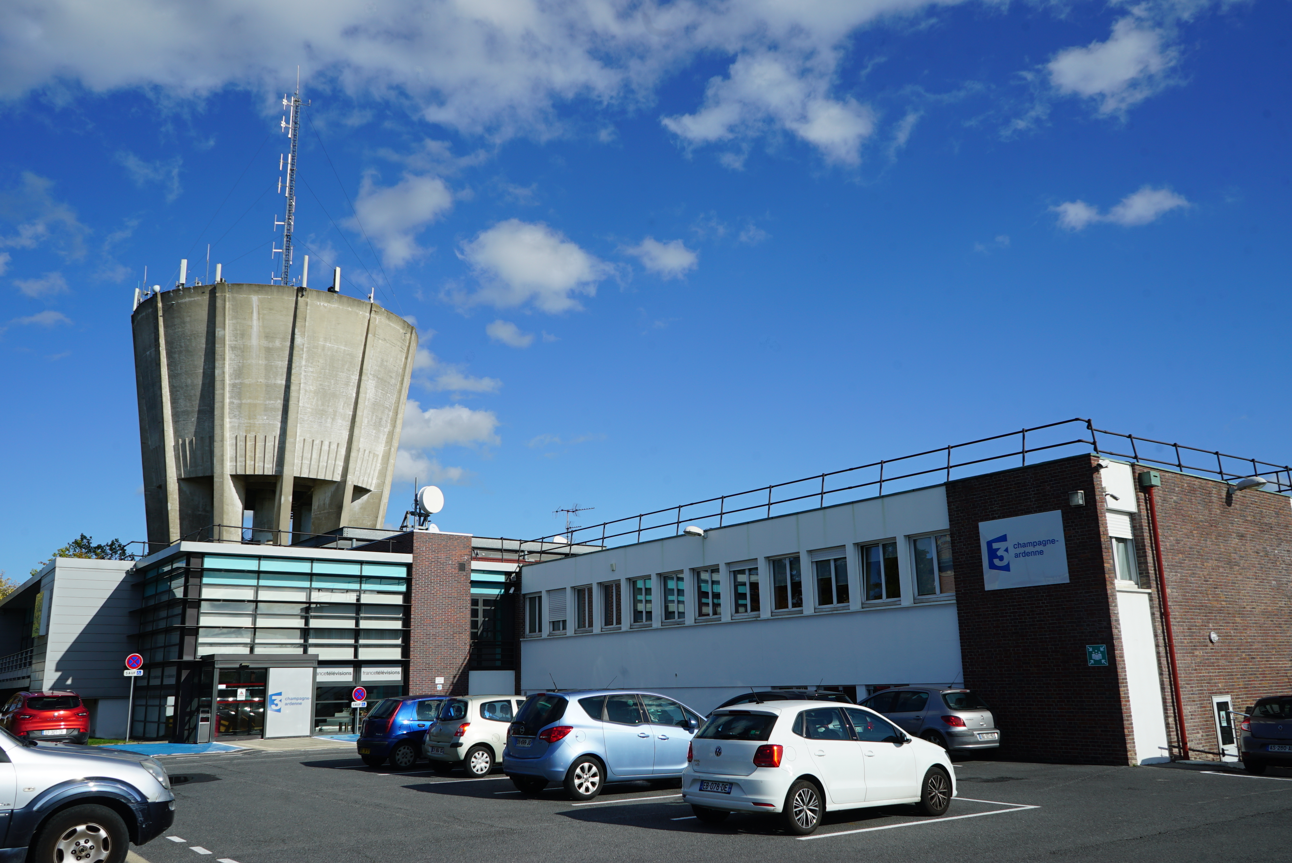 bâtiment à Reims.